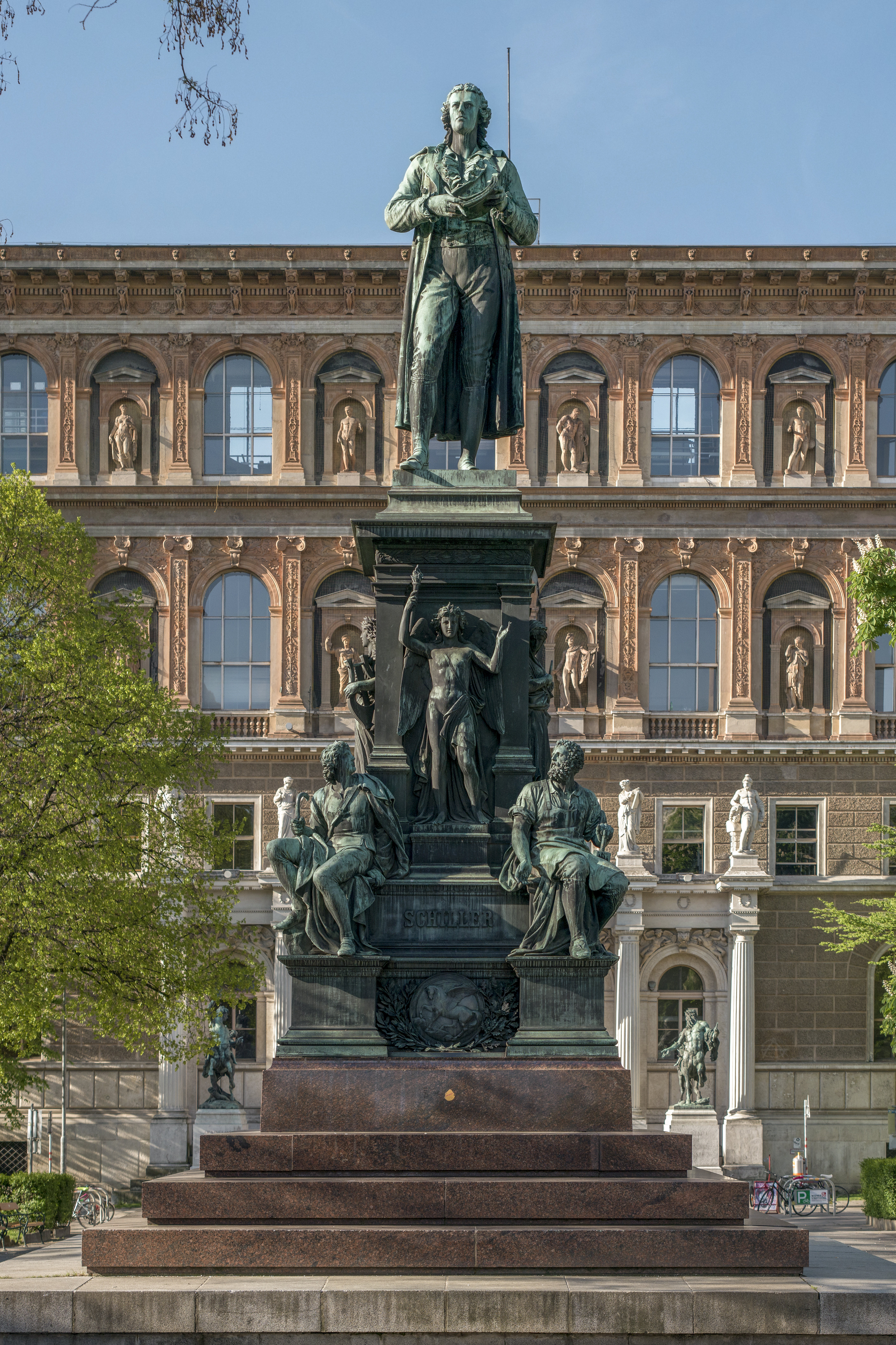 Schillerdenkmal, Vienna